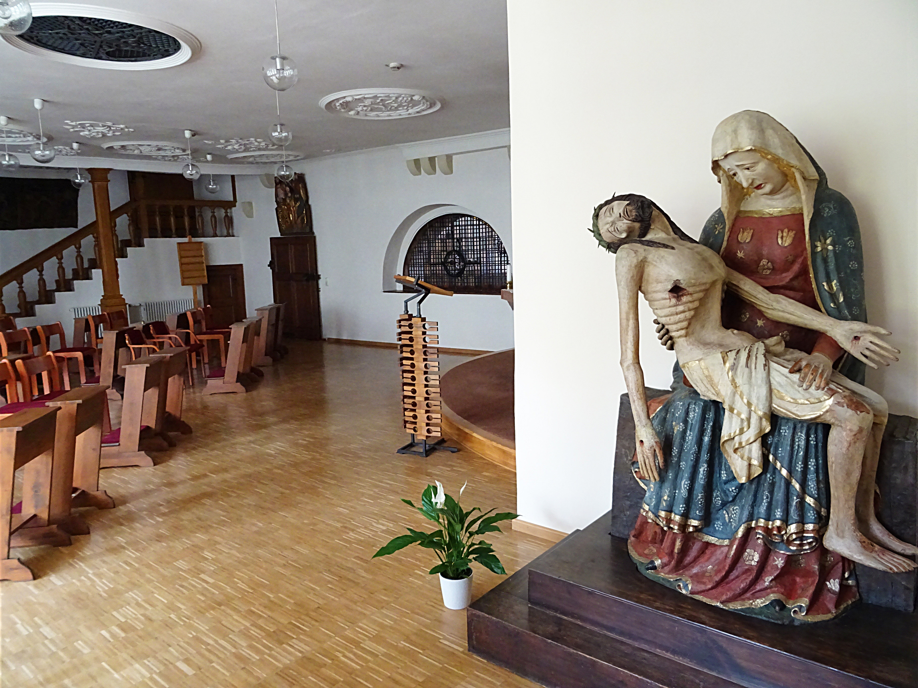 Schmerzensmutter mit dem Leichnam des vom Kreuz abgenommenen Jesus Christus, mittelalterliche Pietá aus der Zeit der Magdalenerinnen (1340) im Ursulinenkloster Erfurt